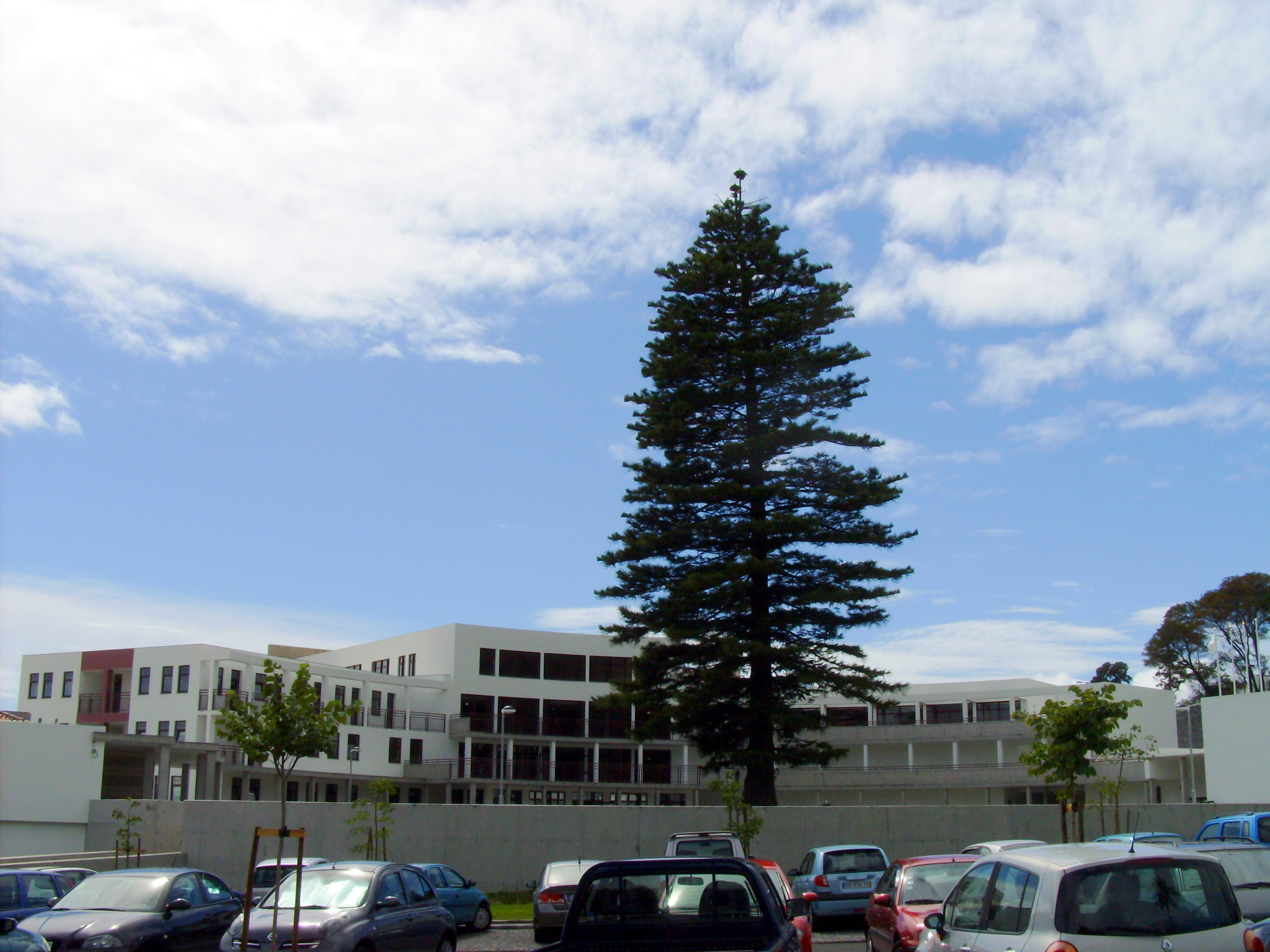 Escola Básica e Secundária Tomás de Borba, Angra do Heroísmo, Ilha Terceira, Açores: entrada.